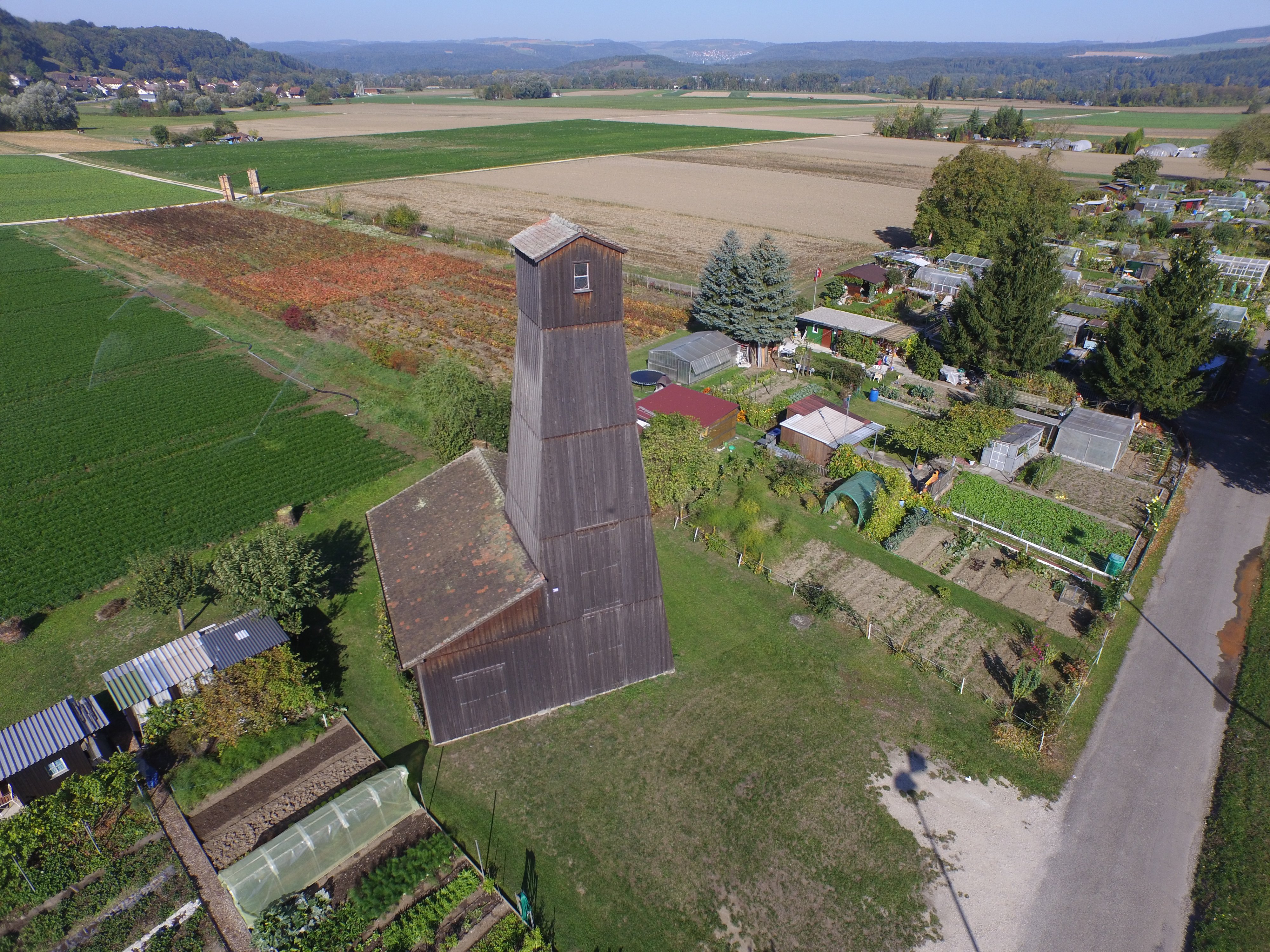 Bohrturm in Bad Zurzach